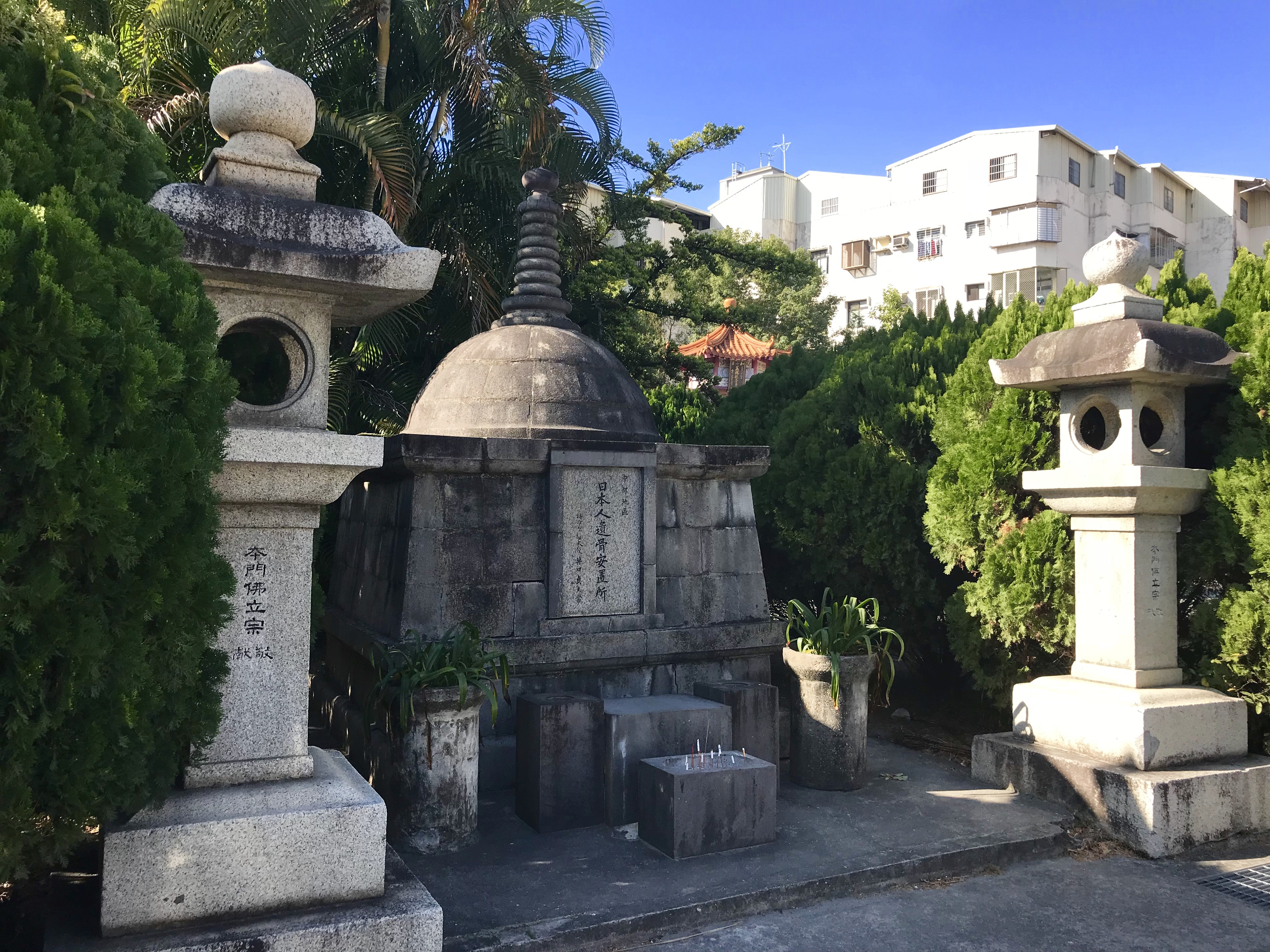 中文（台灣）: 寶覺寺日本人遺骨安置所